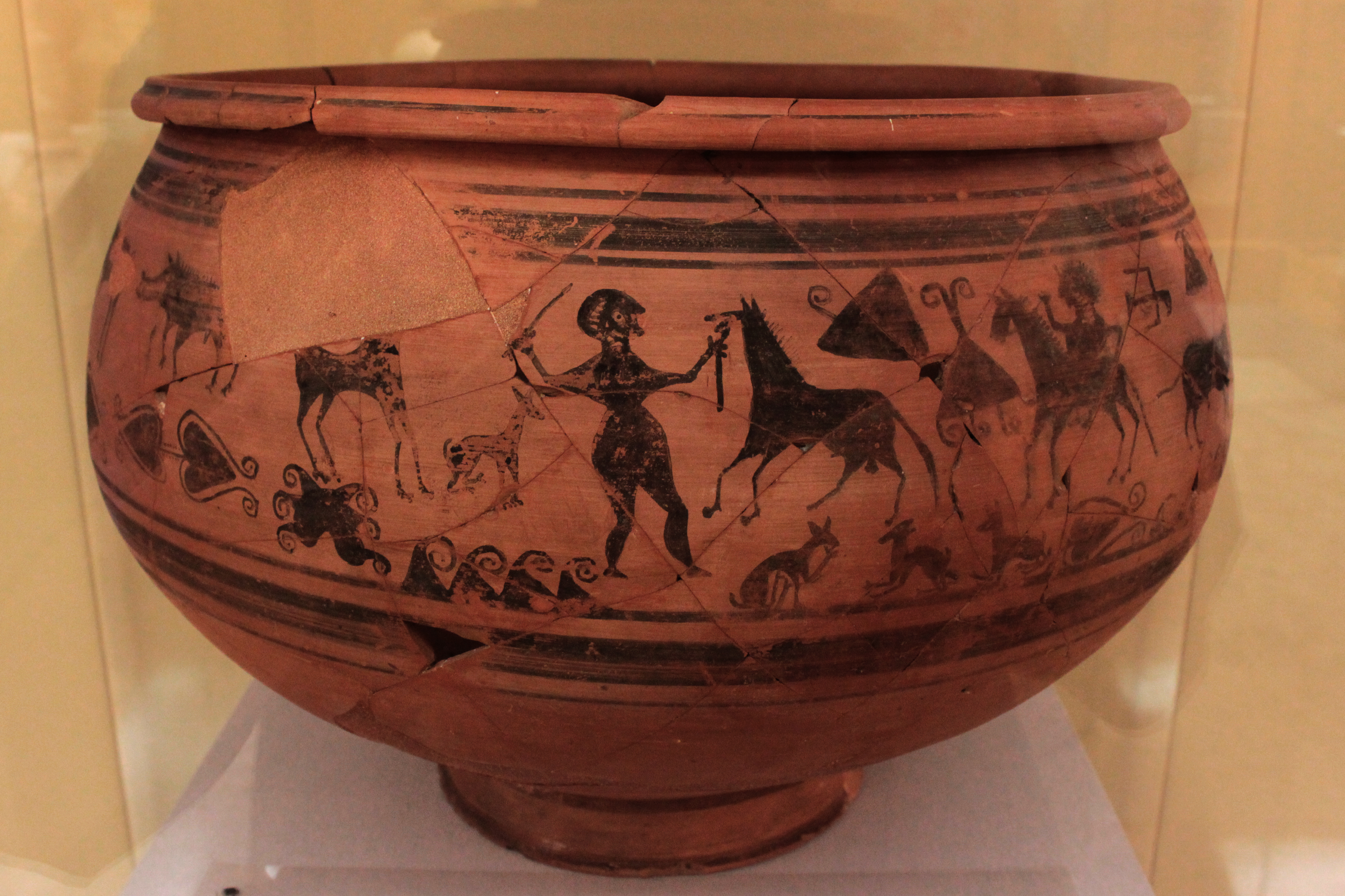 Vaso de la doma, siglos III al II aC del yacimiento del Tossal de Sant Miguel. Depositada en el Museo de Prehistoria de Valencia, Comunidad valenciana, España.